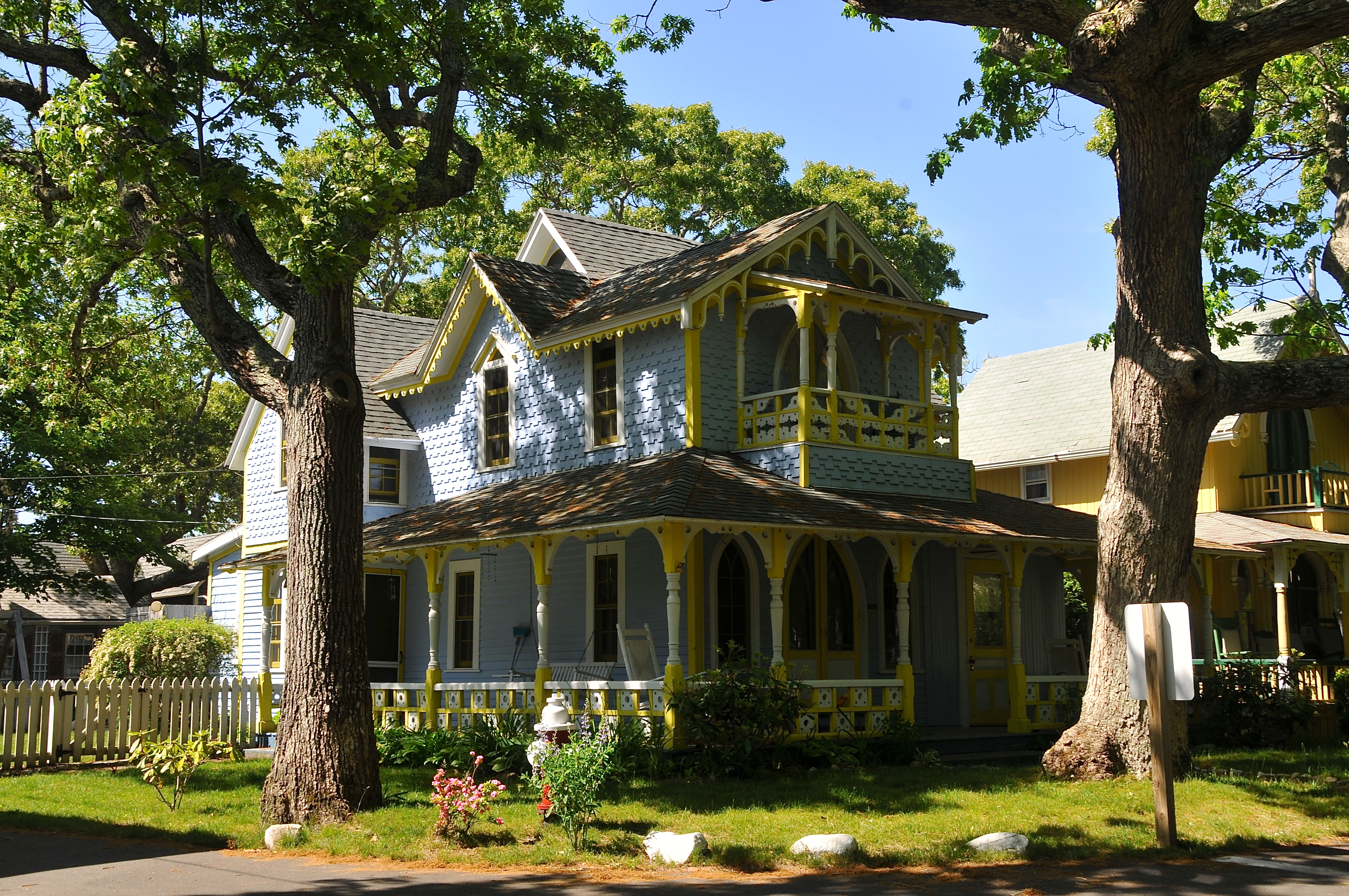 De Gingerbread (letterlijk: peperkoek) Houses in Oak Bluffs lijken rechtstreeks uit een sprookje te komen. Lokale methodisten zetten hier vanaf 1835 zomertenten neer voor hun kamp. Langzamerhand werd dit tentenkamp vervangen door kleurrijke Victoriaanse huisjes en winkeltjes. De Gingerbread Houses of cottages zijn nu in gebruik als vakantiehuisjes.